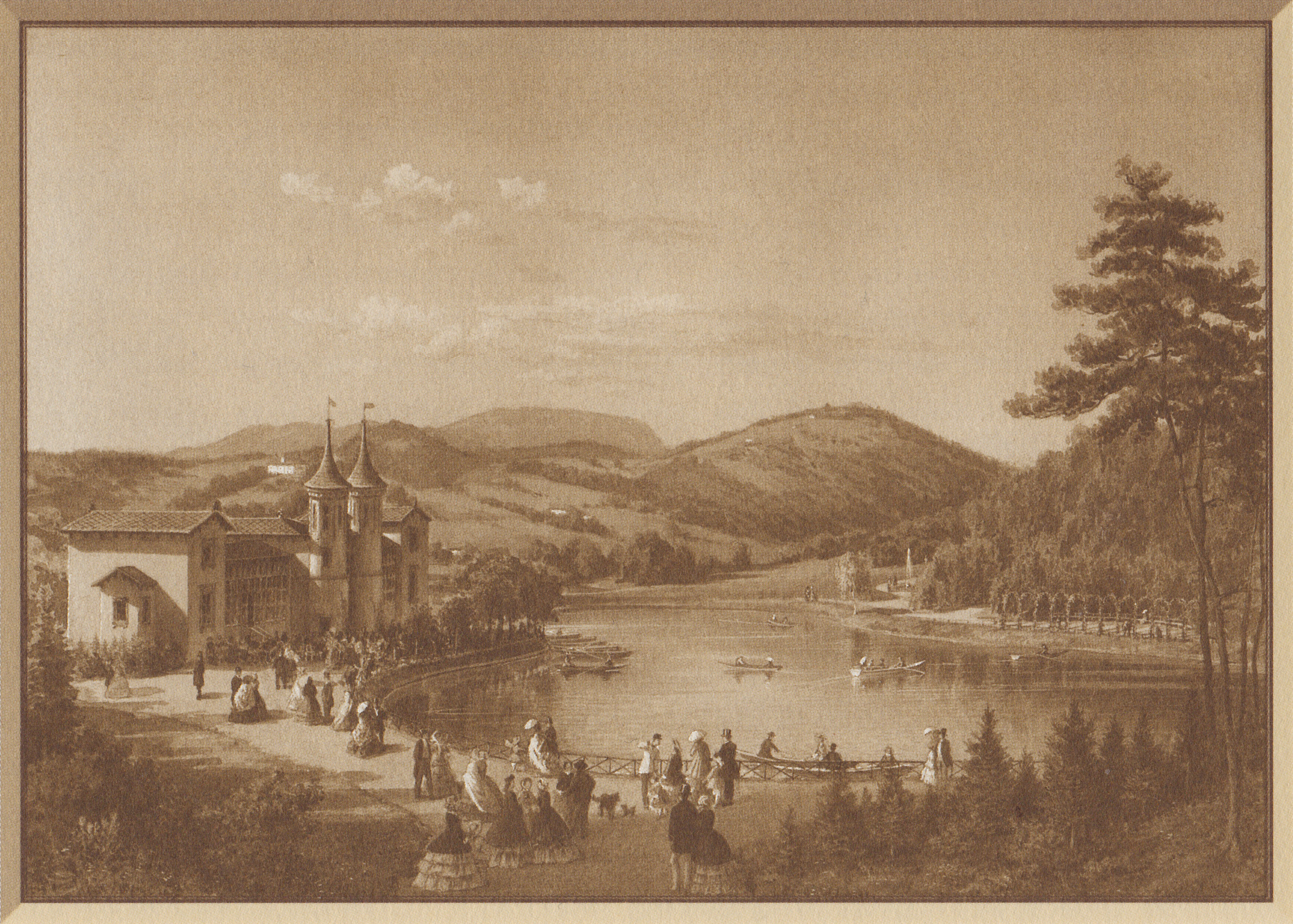 Hilmteich und Hilmteichschlössel in Graz, Reproduktion eines Aquarells von Heinrich Bank durch das Steiermärkische Landesarchiv